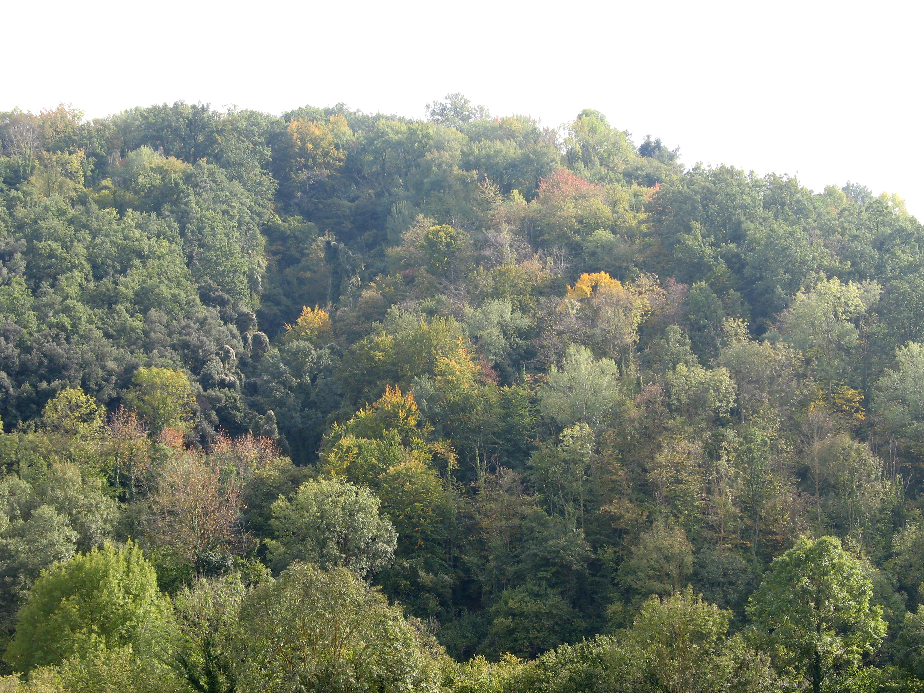 Mixed deciduous forest in La Garrotxa, Catalonia, Spain